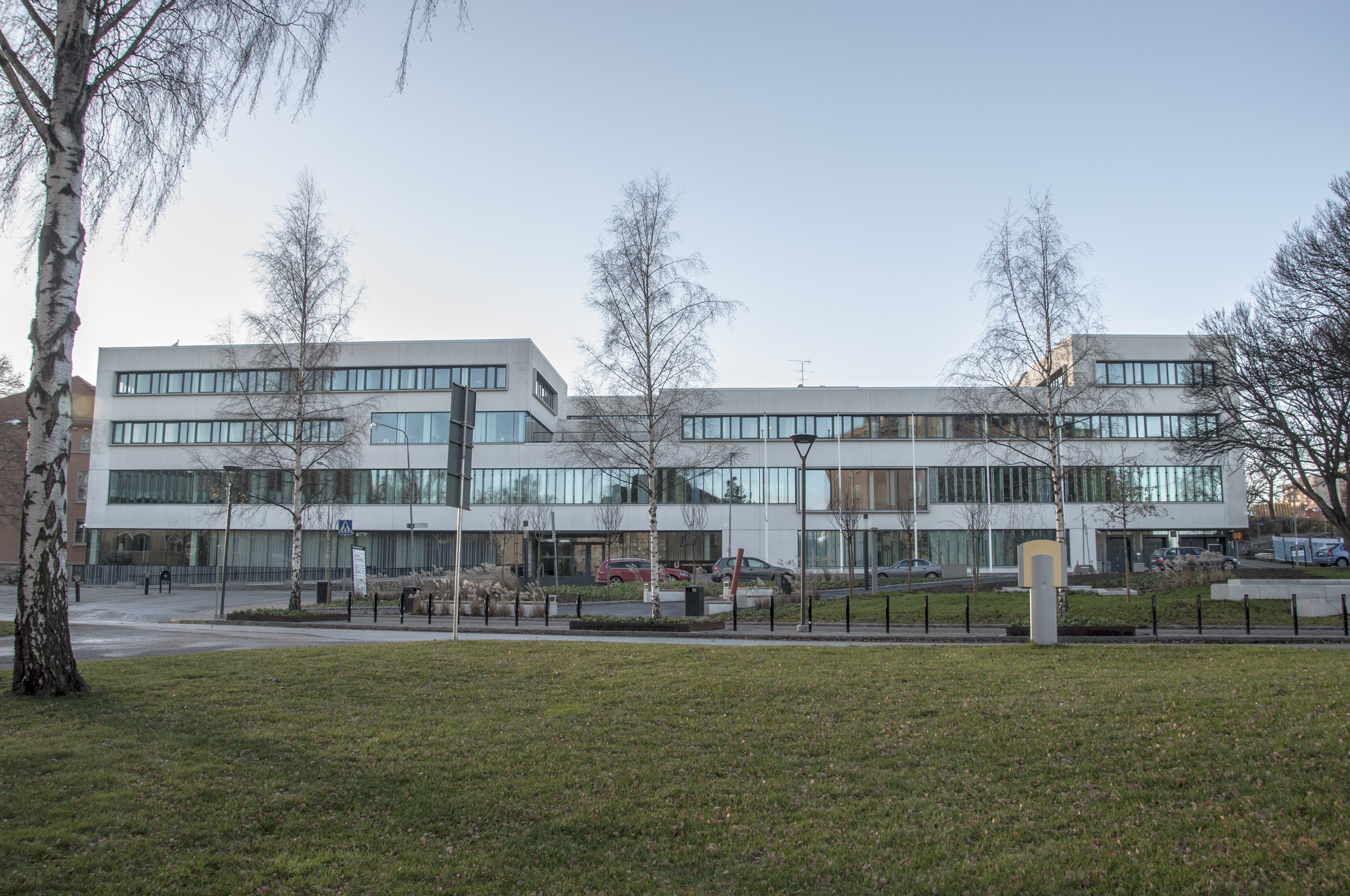 Försvarshögskolan Drottning Kristinas väg 37, Stockholm. Byggnadsår 2005. Berg Arkitekter